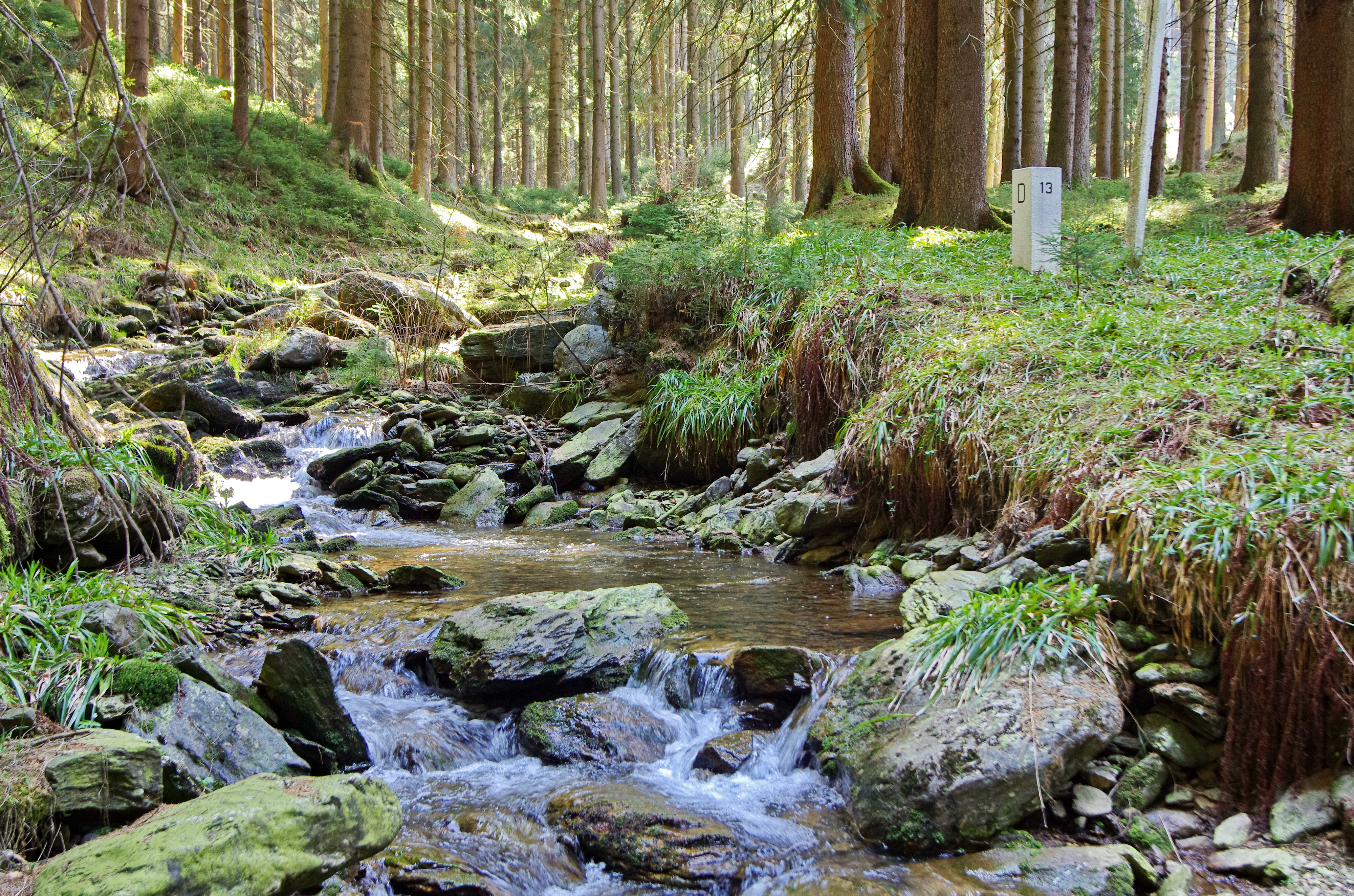 Komáří potok, na česko-německé hranici, přítok Zlatého potoka v Přírodním parku Zlatý kopec, okres Karlovy Vary